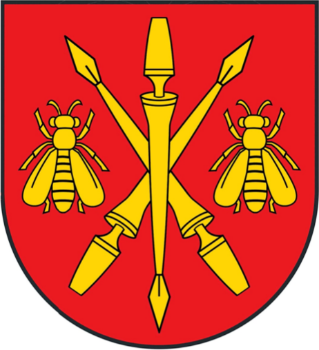 Herb gminy Godziszów